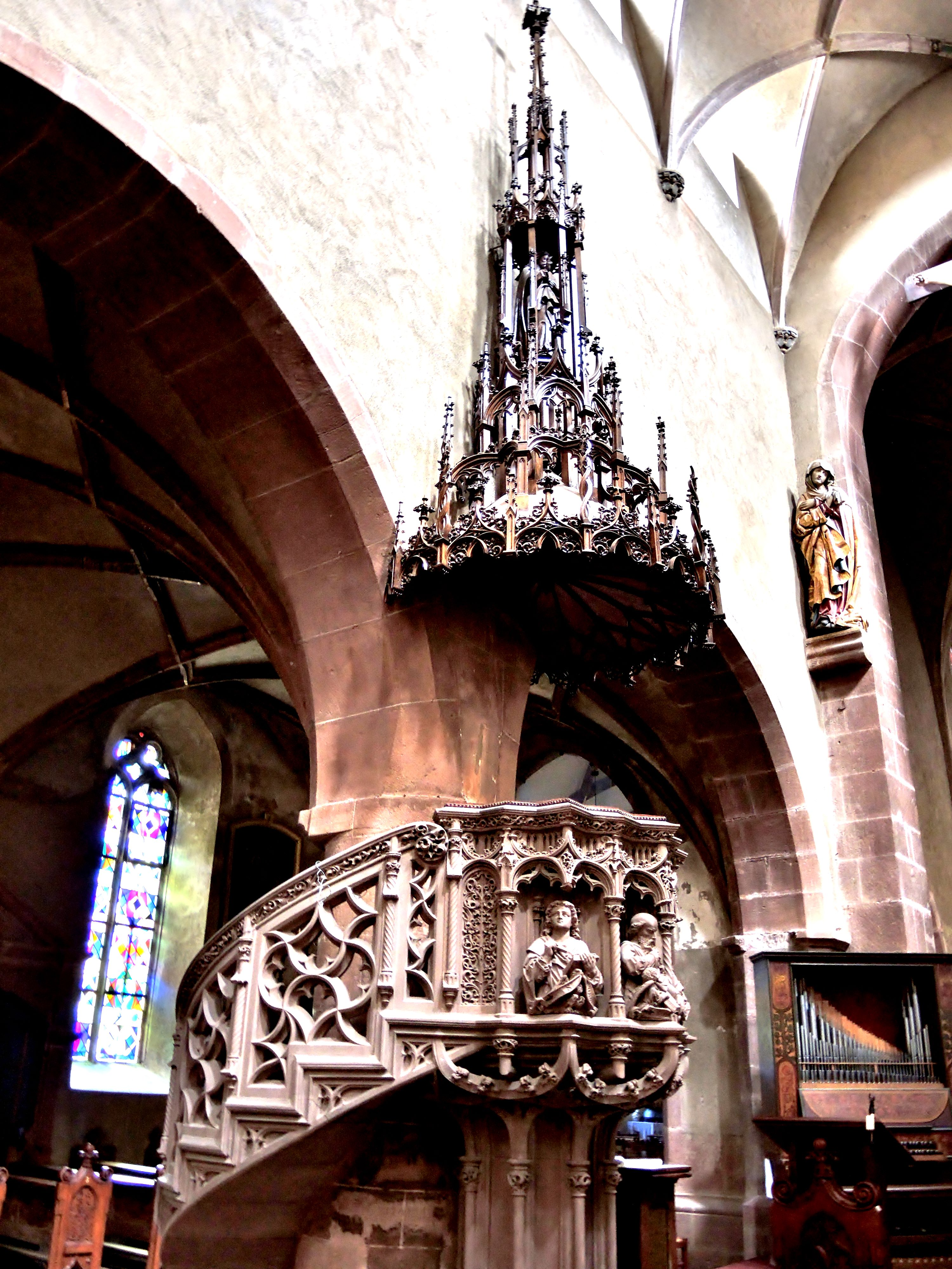 Chaire de l'église d'Ammerschwihr. Haut-Rhin